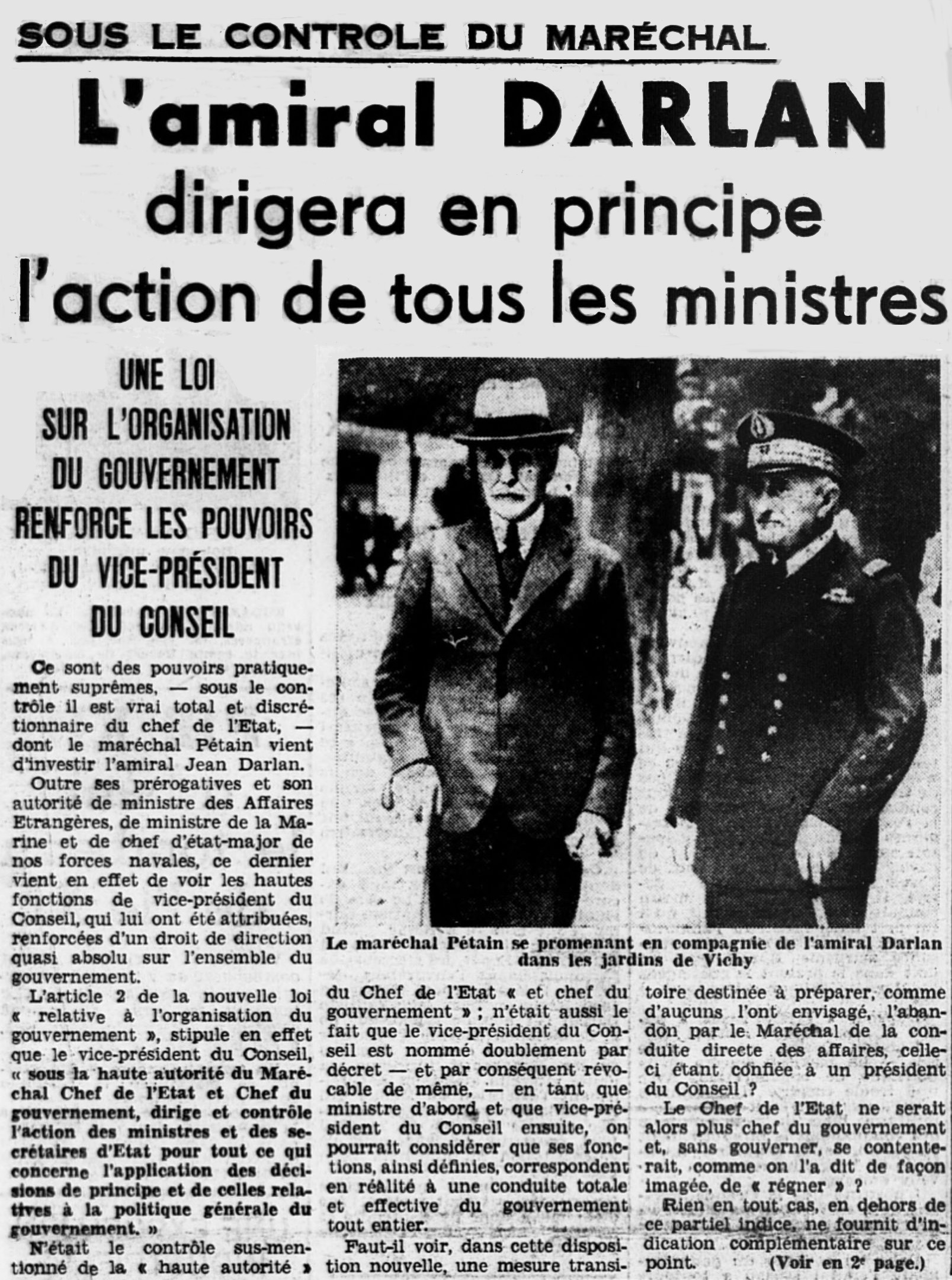 Une du journal L'Ouest-Éclair (n° 16147) du 12 février 1941.